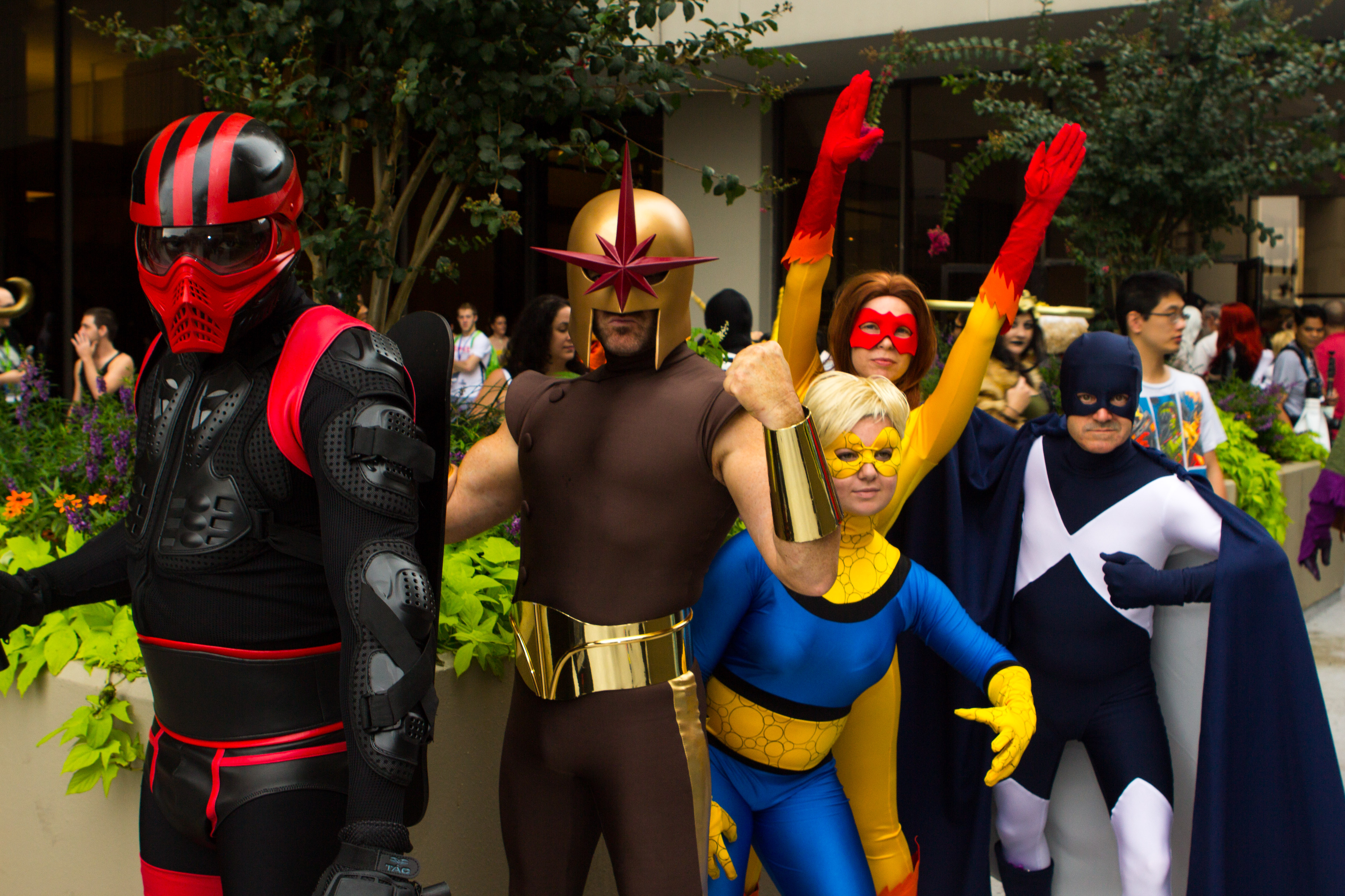 Cosplay at Dragon*Con 2013.